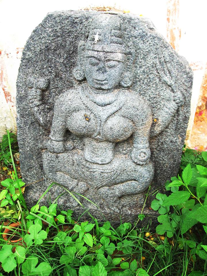 వెల్మజాలలోని శాసనం